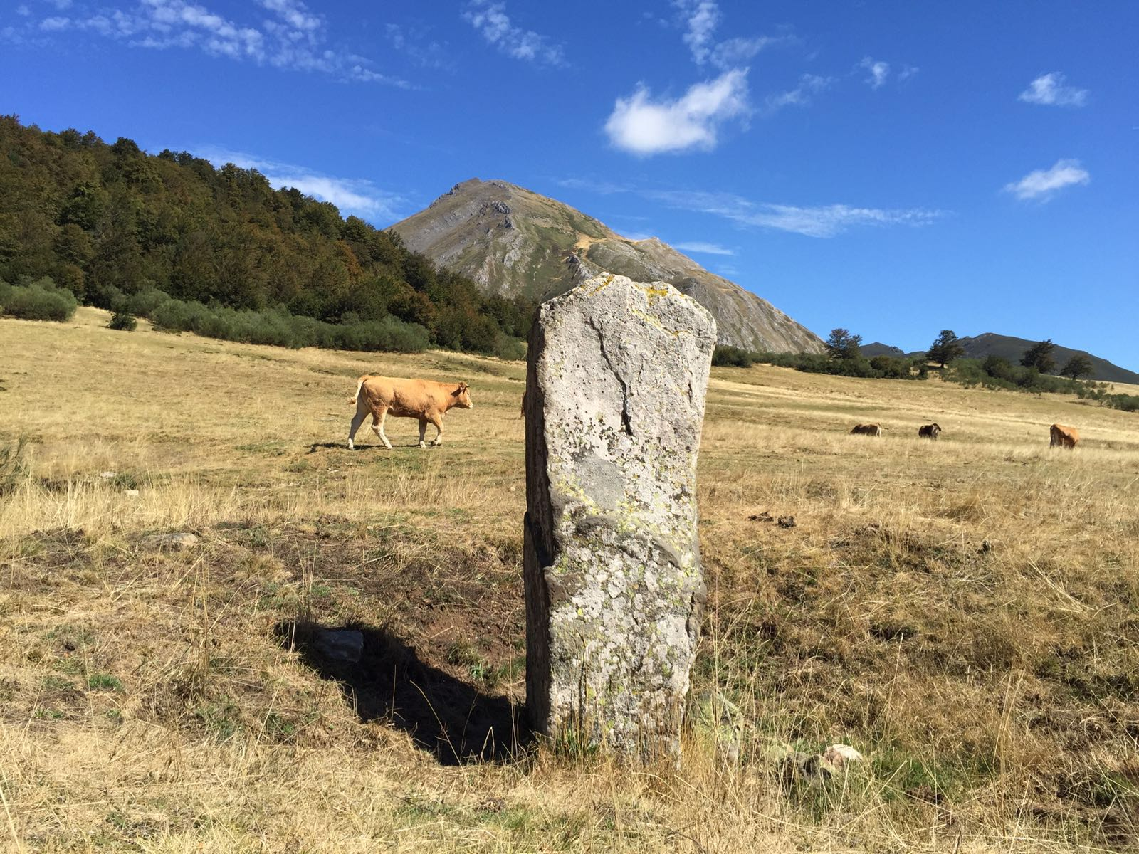 Megalito de La Uña. En el valle de Valdosín. Con la Peña Ten al fondo.